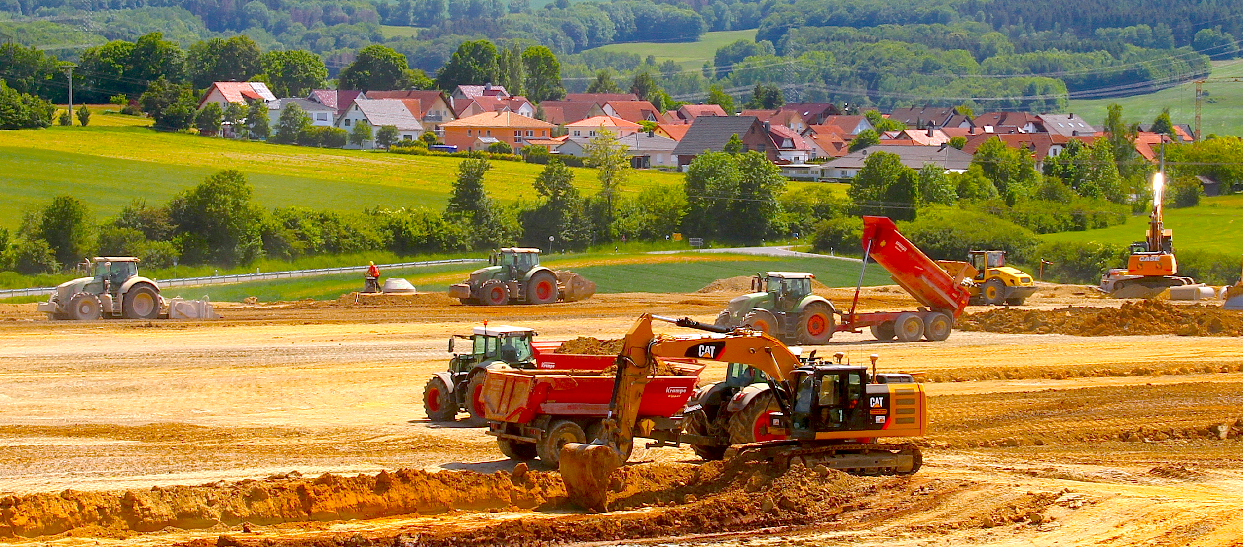 Rückers (Flieden) - Blick vom Eisenküppel auf das Rückerser Neubaugebiet "Kalbacher Pfad", im Hintergrund das Naherholungs- und Quellgebiet Steinkammer im Naturpark Hess. Rhön